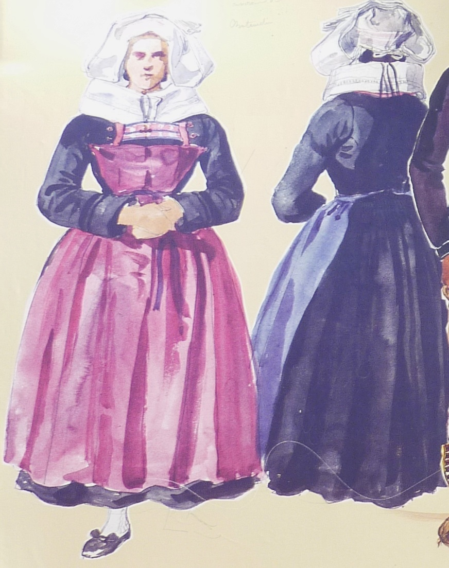 François Hippolyte Lalaisse : Femme de Châteaulin (Galerie armoricaine, 1848)